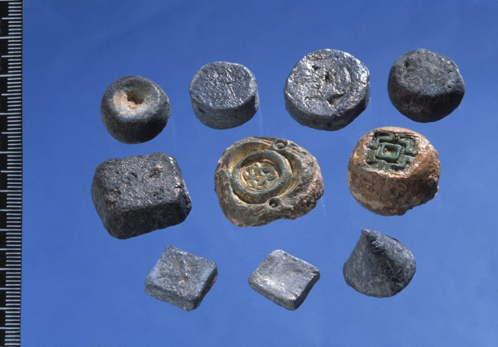 Number 33: Llanbedrgoch Viking weights